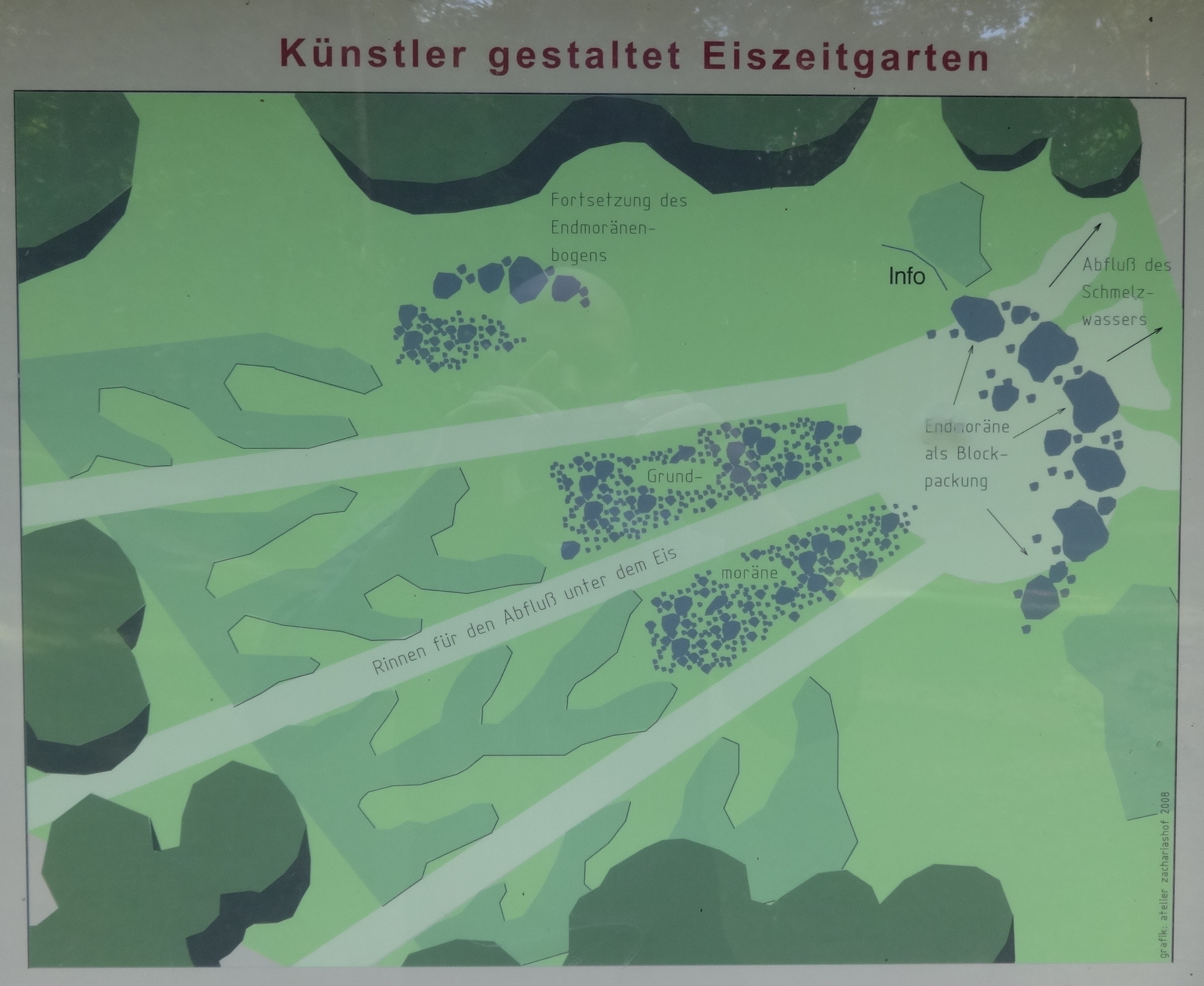 Eiszeitgarten Buckow (Märkische Schweiz) - eine gärtnerische Darstellung der eiszeitlich geprägten Landschaft um Buckow, gelegen im Lunapark an der Buckowseepromenade in Buckow Der Aufbau wurde auf einer der öffentlich zugänglichen Tafeln abfotografiert.